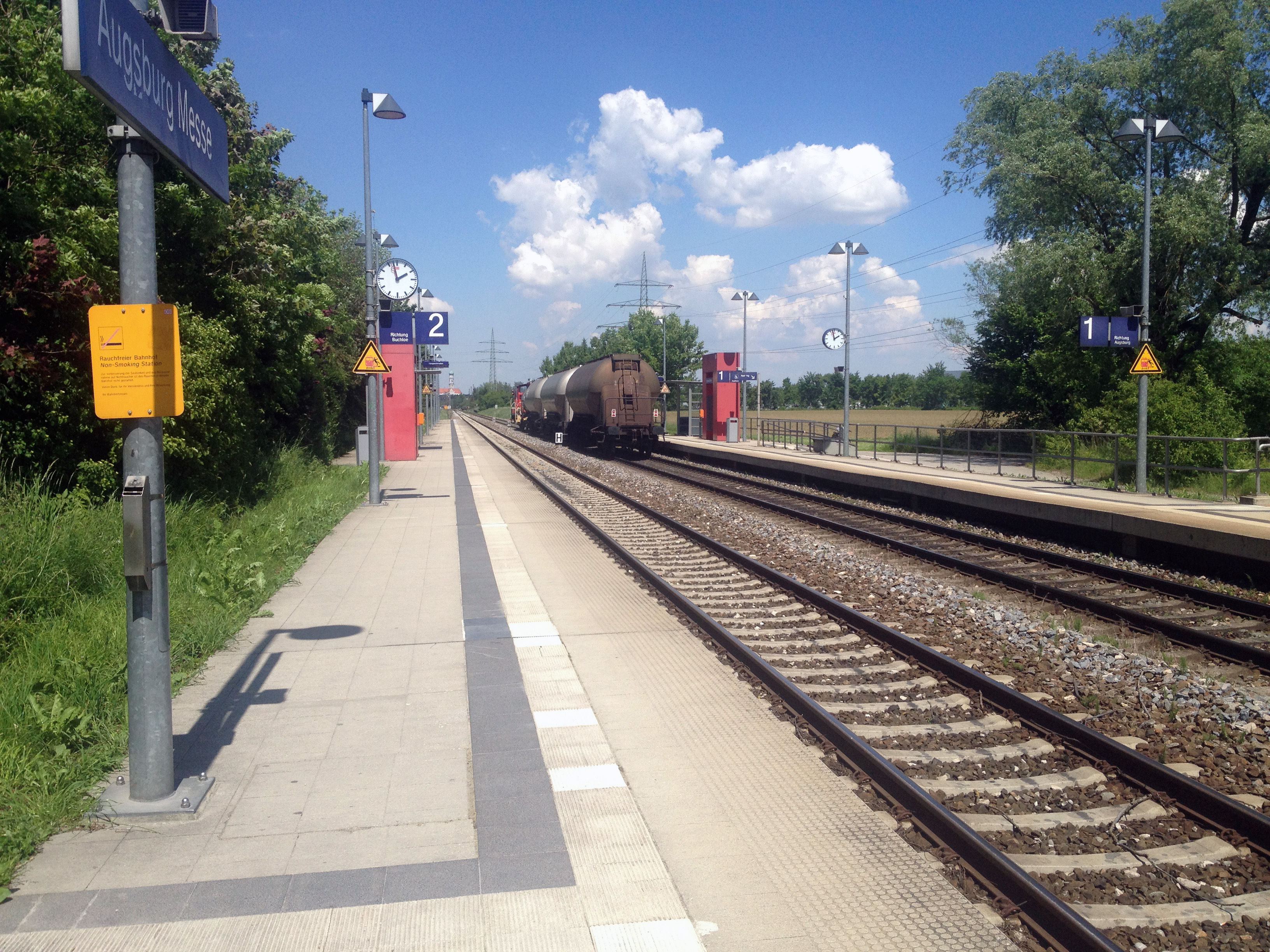 Der Bahnhof Augsburg Messe.